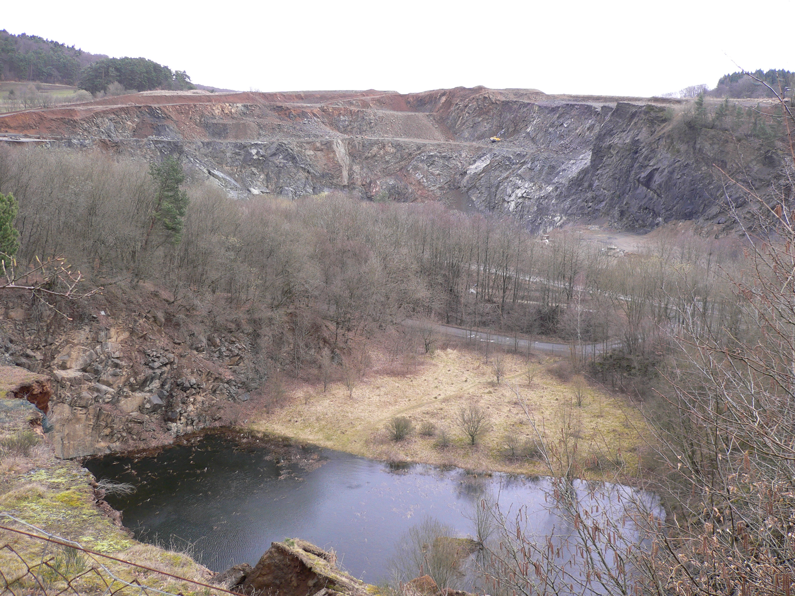 Diabas-Steinbruch „Hahnkopf“ bei Bad Enbach-Wommelshausen